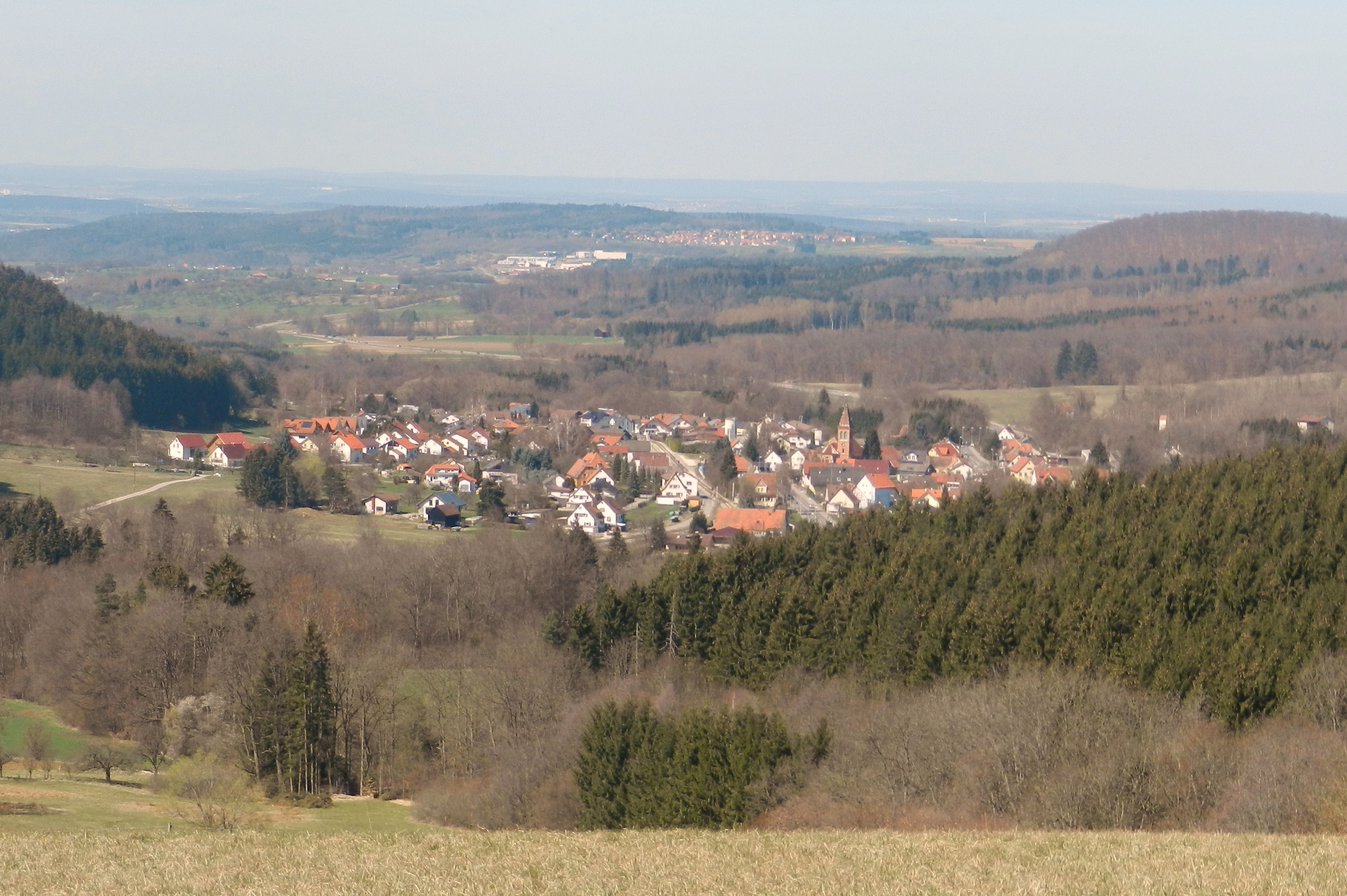 Hechingen-Schlatt, Südansicht